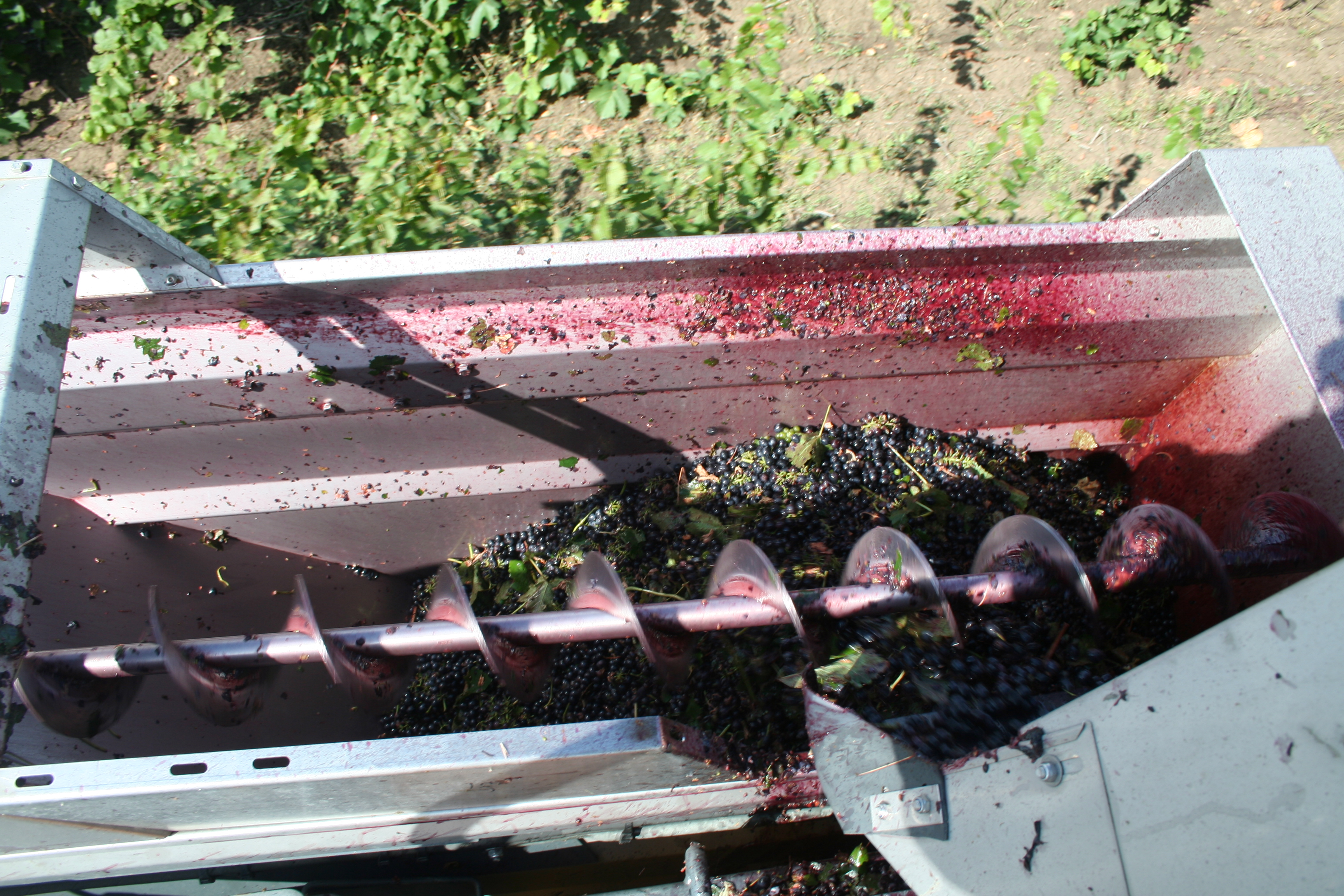 Fontès (Hérault) - machine à vendanger.